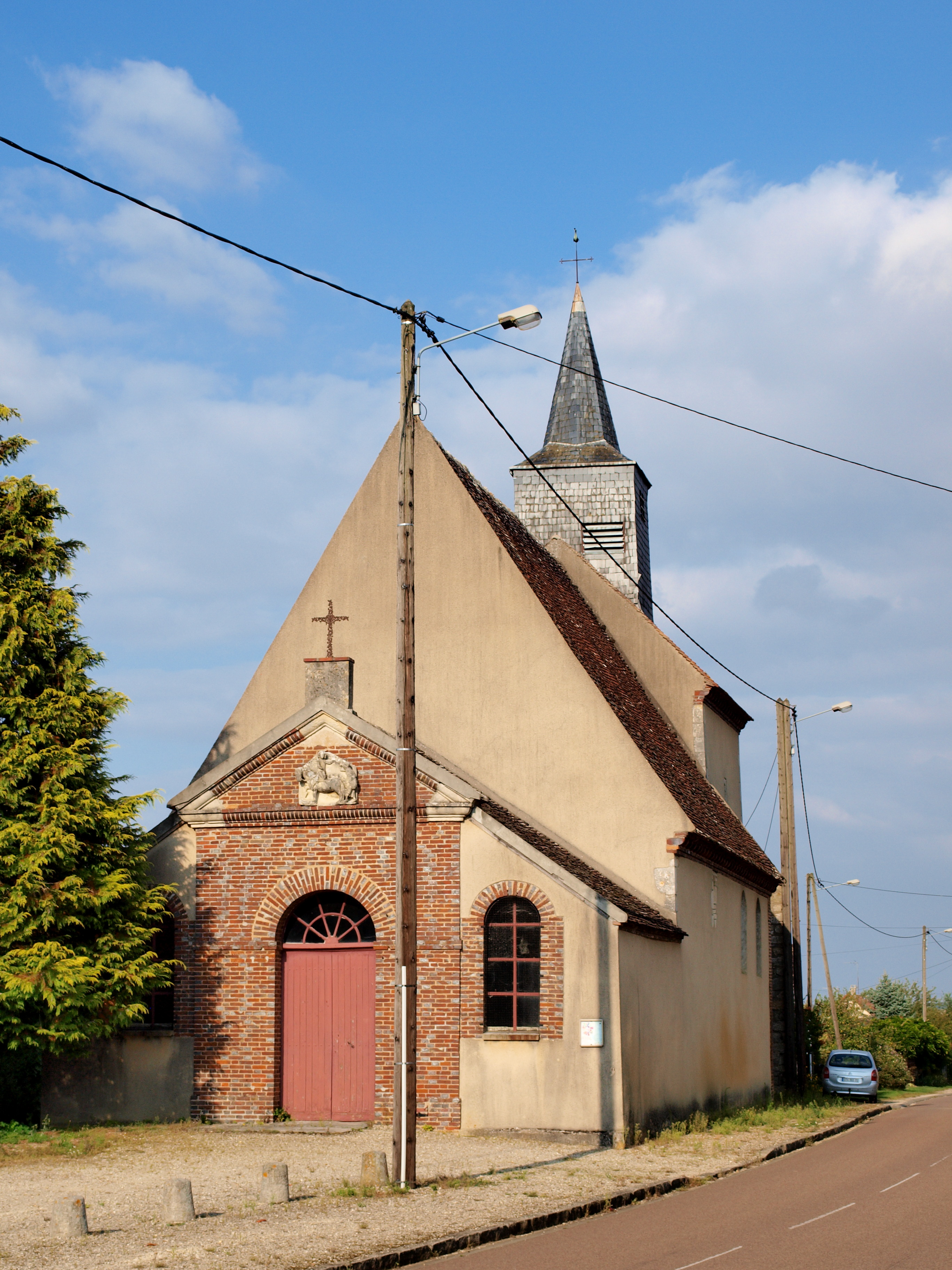 Theil-sur-Vanne (Yonne, France) ; église